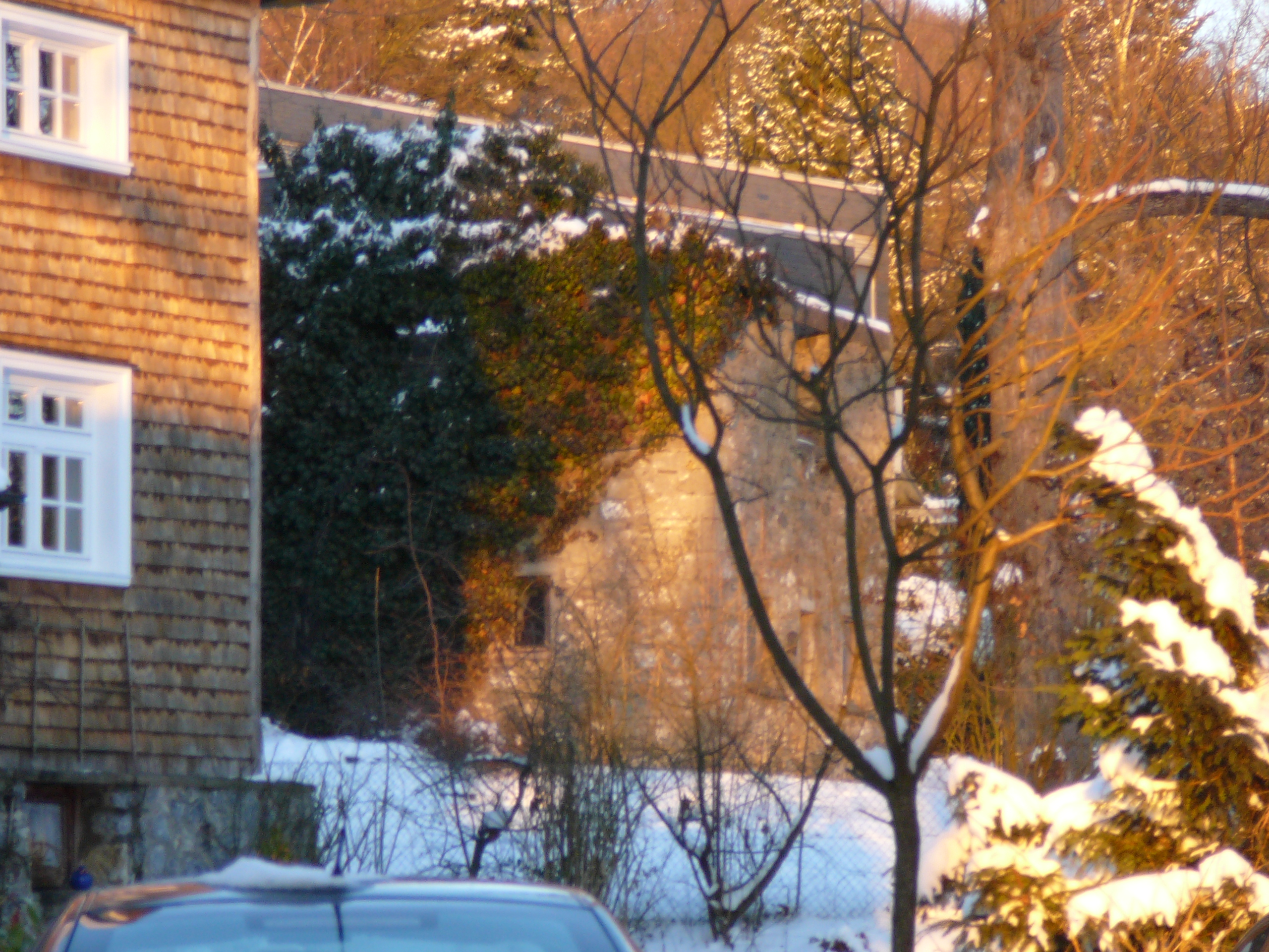 Melanchthonstraße, Wuppertal